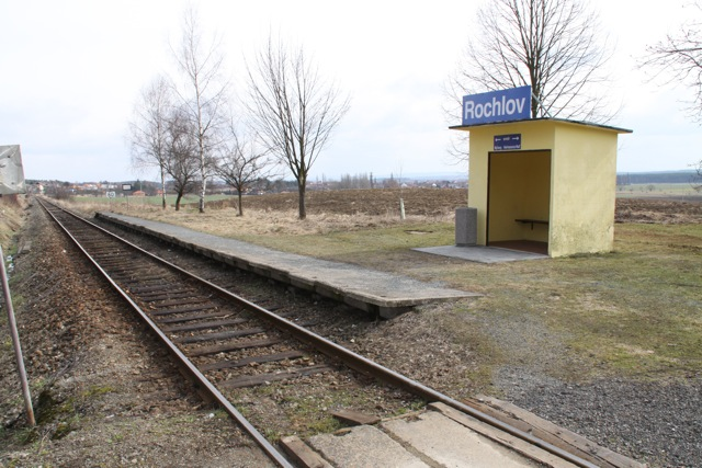 Haltepunkt Rochlov